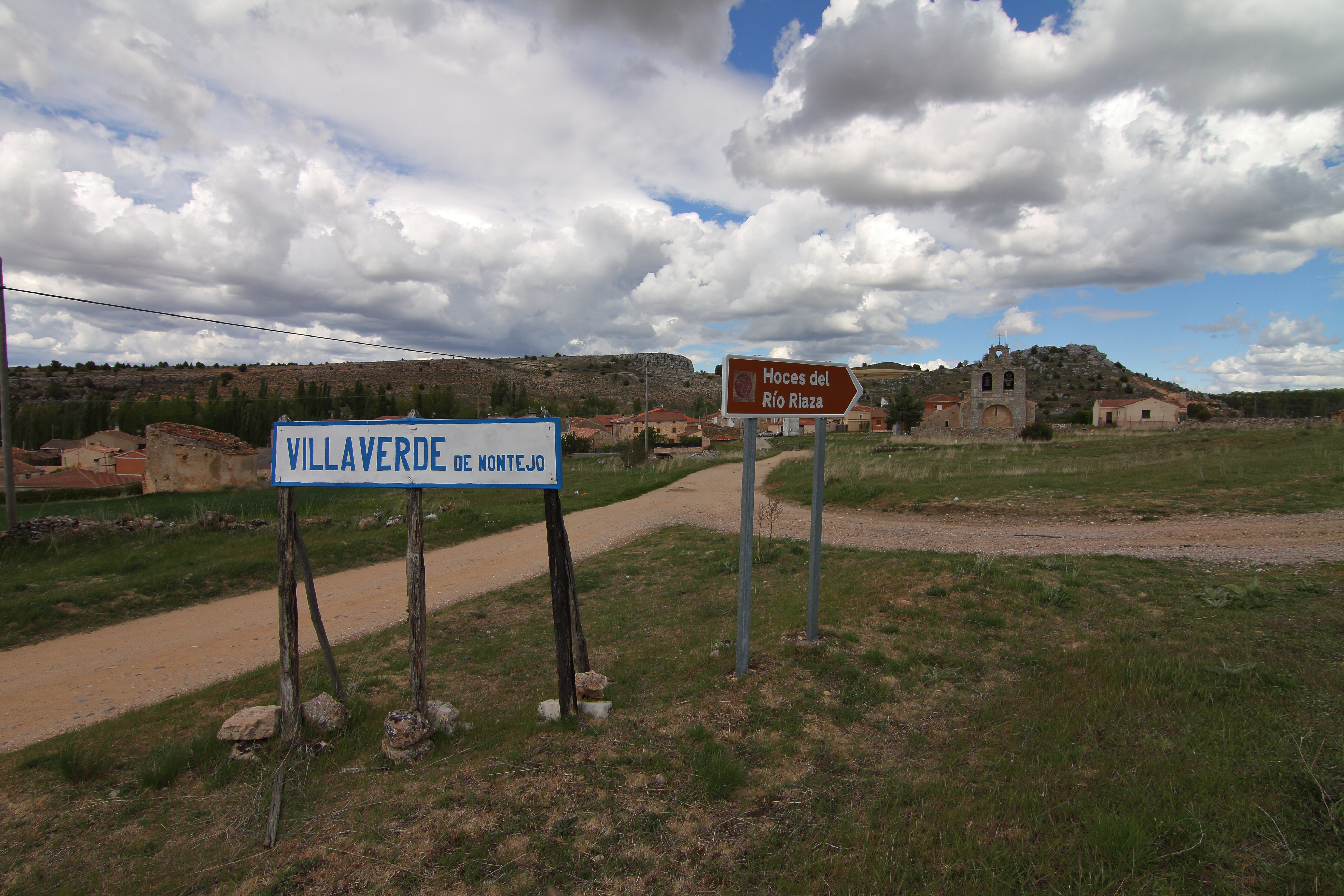 Villaverde de Montejo, vista población desde BU-V 9321